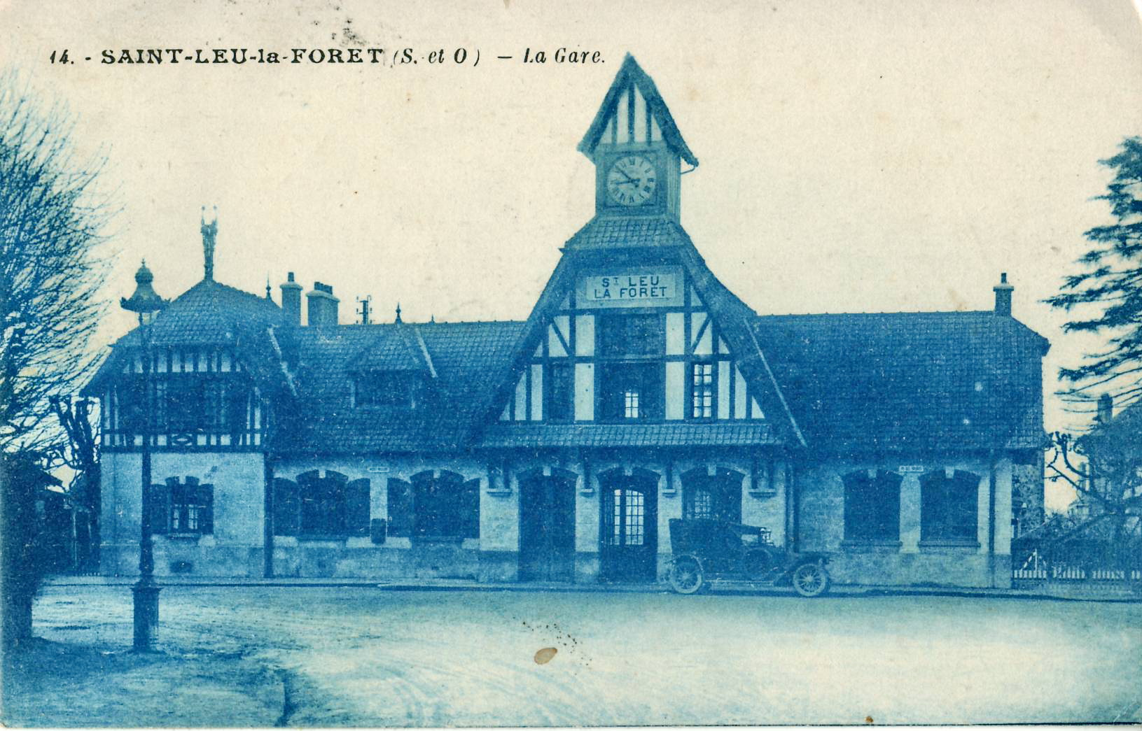 Carte postale ancienne éditée par Photo-Éditions, n°14 : SAINT-LEU-LA-FORET - La gare